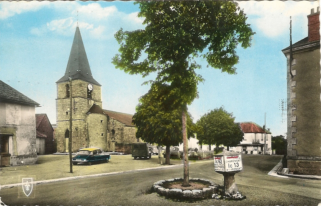 Bourg d'Espinasse vu de la D13.